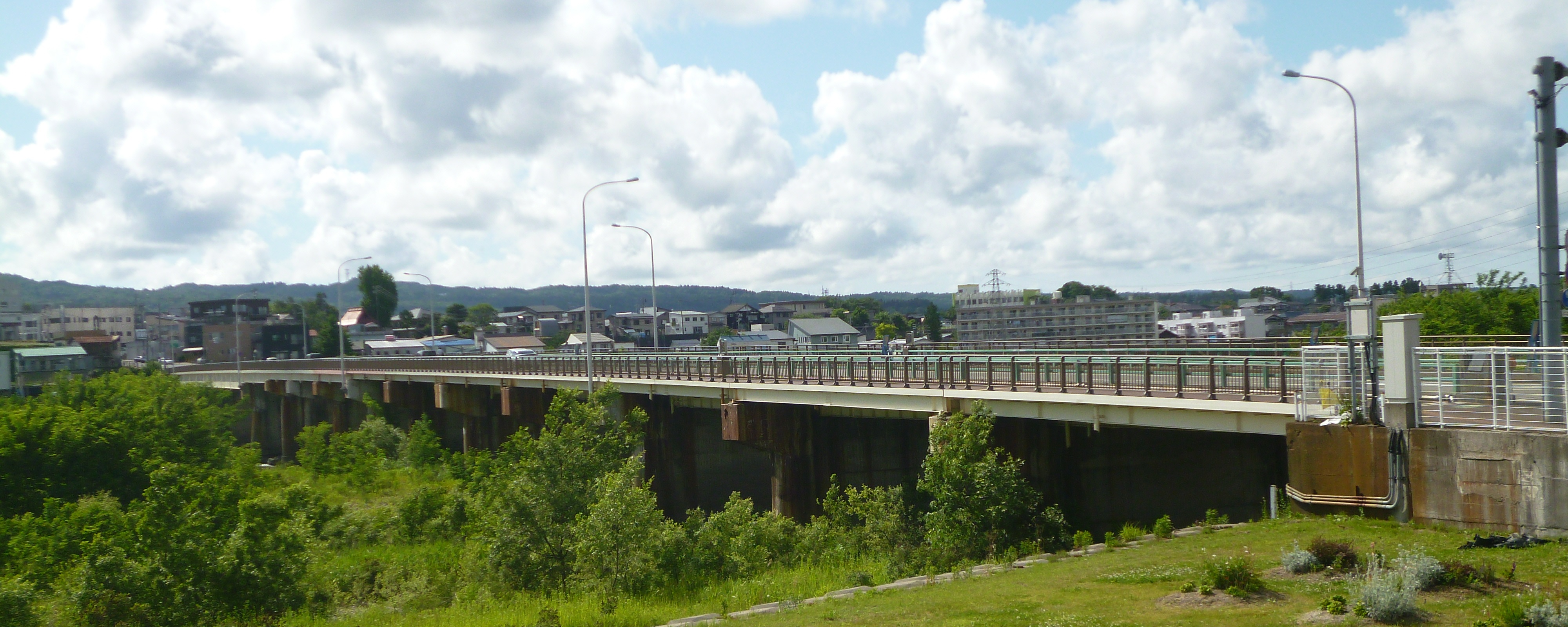 旭橋。右岸より撮影。